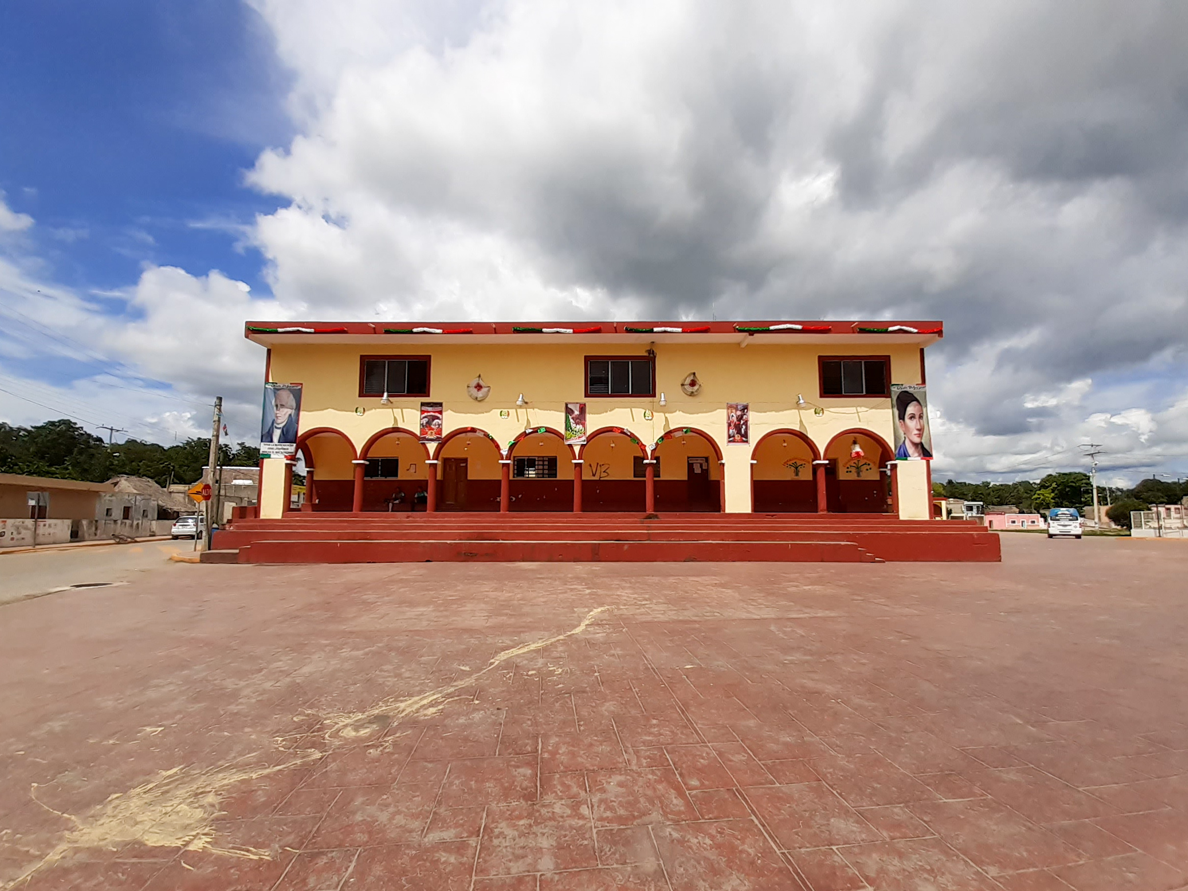 palacio municipal de Chikindzonot